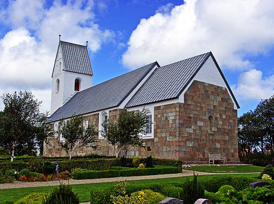 fra sydøst